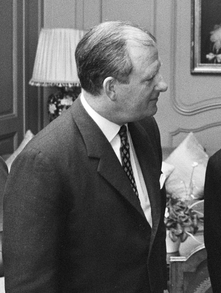 Britse ambassadeur reikt onderscheidingen uit op Amb. Den Haag ; ambass. Sir Edward Tomkins, jhr. M. L. H. Sandberg en prof. dr.A.G.H. Bachrach